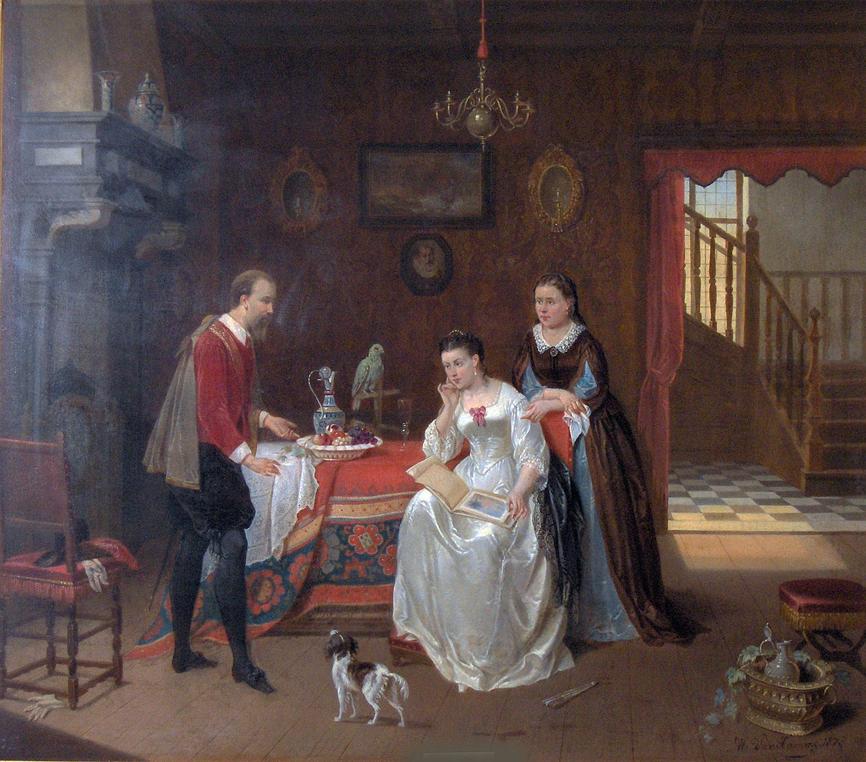 "Geanimeerd adelijk interieur" (1873) door Alexis Van Hamme (1818-1875); olieverf op paneel 70 x 82 cm; privé-bezit